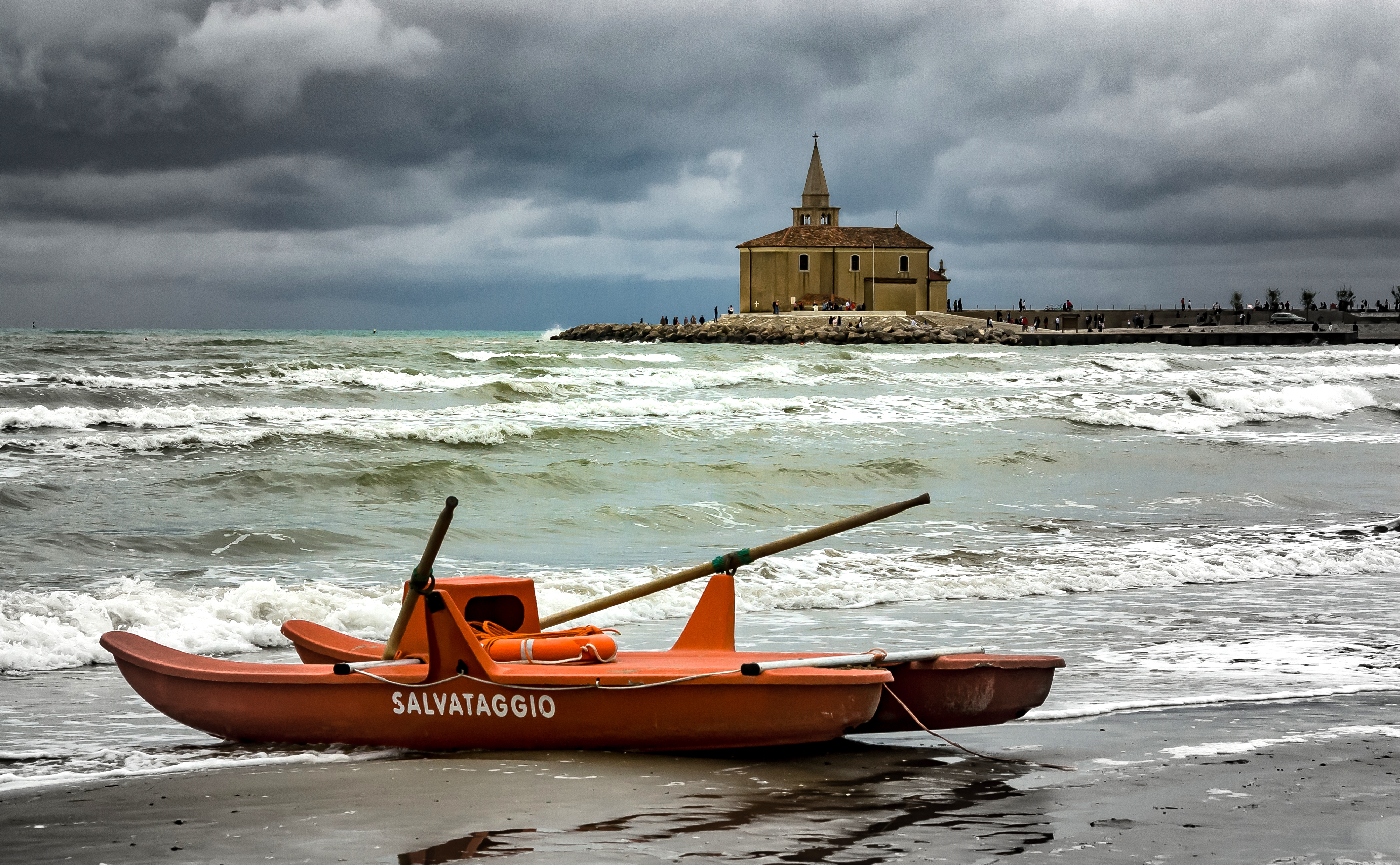 Salvataggio